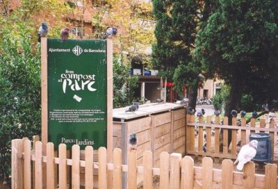 Komunitní kompostoviště obyvatel okolních paneláků v centru Barcelony